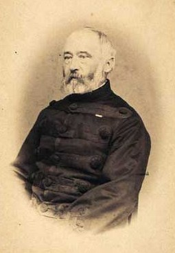 Friedrich Heinrich Andreas Beermann (1814-1895), Danish forester